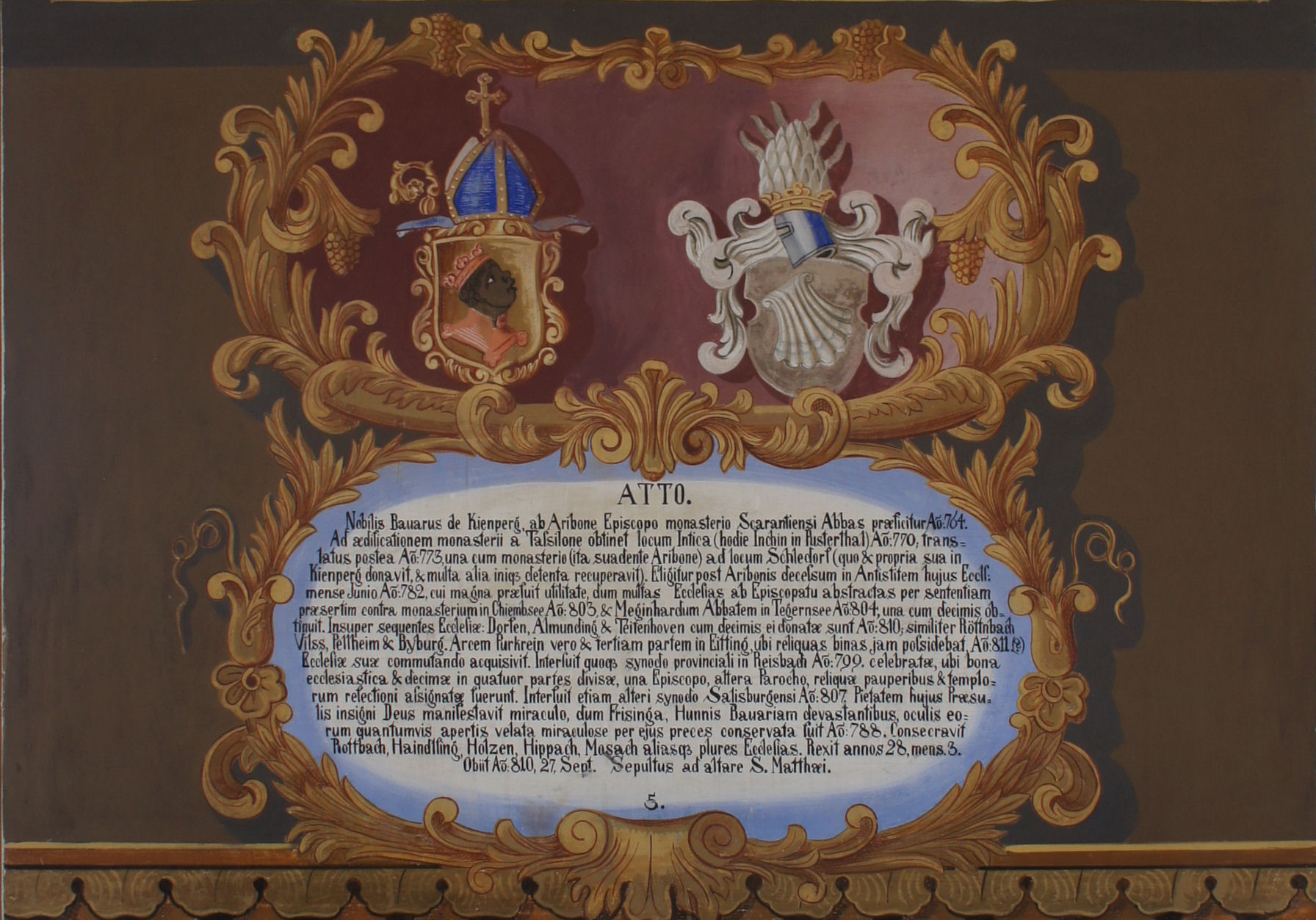 Wappentafel von Atto, Bischof von Freising, im Fürstengang zwischen Fürstbischöflicher Residenz und Freisinger Dom. Links das geistliche, rechts das persönliche Wappen, darunter ein lateinischer Text mit kurzer Biographie.